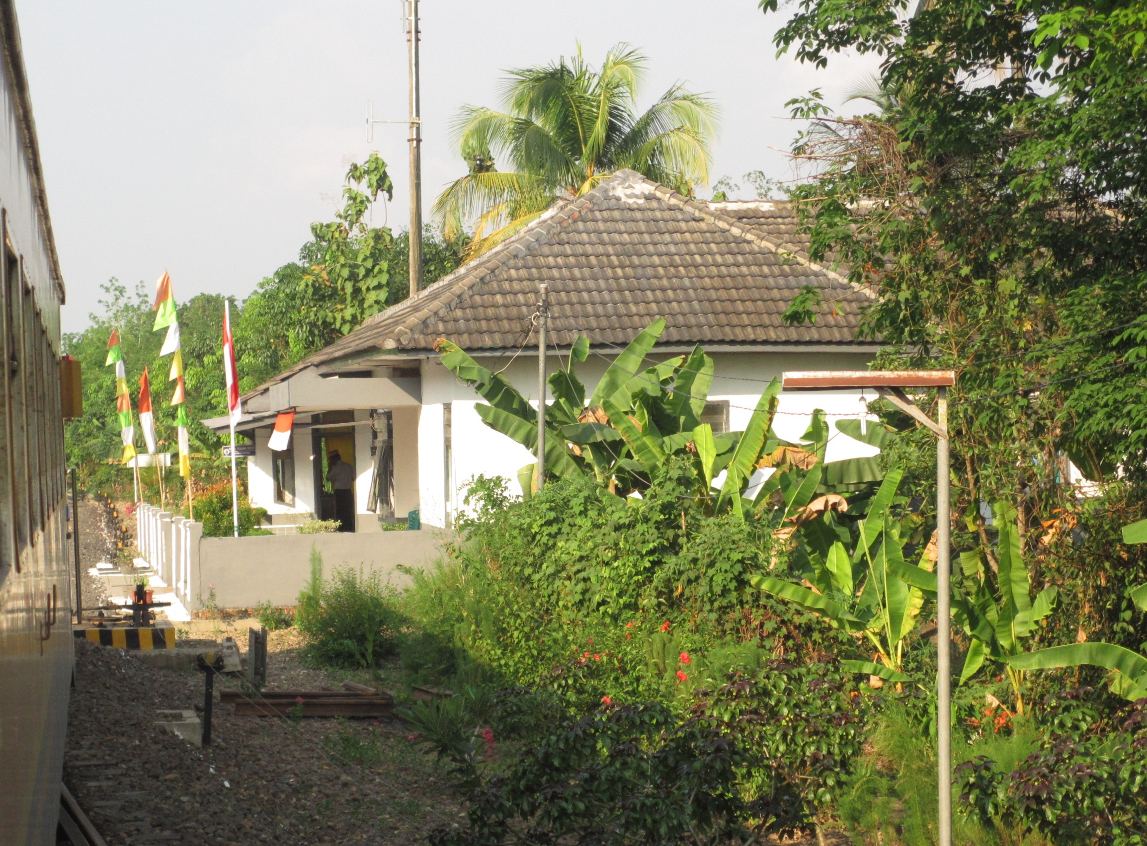 Stasiun Belimbingairkaka